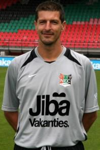 Gabor Babos goalkeeper for NEC Nijmegen